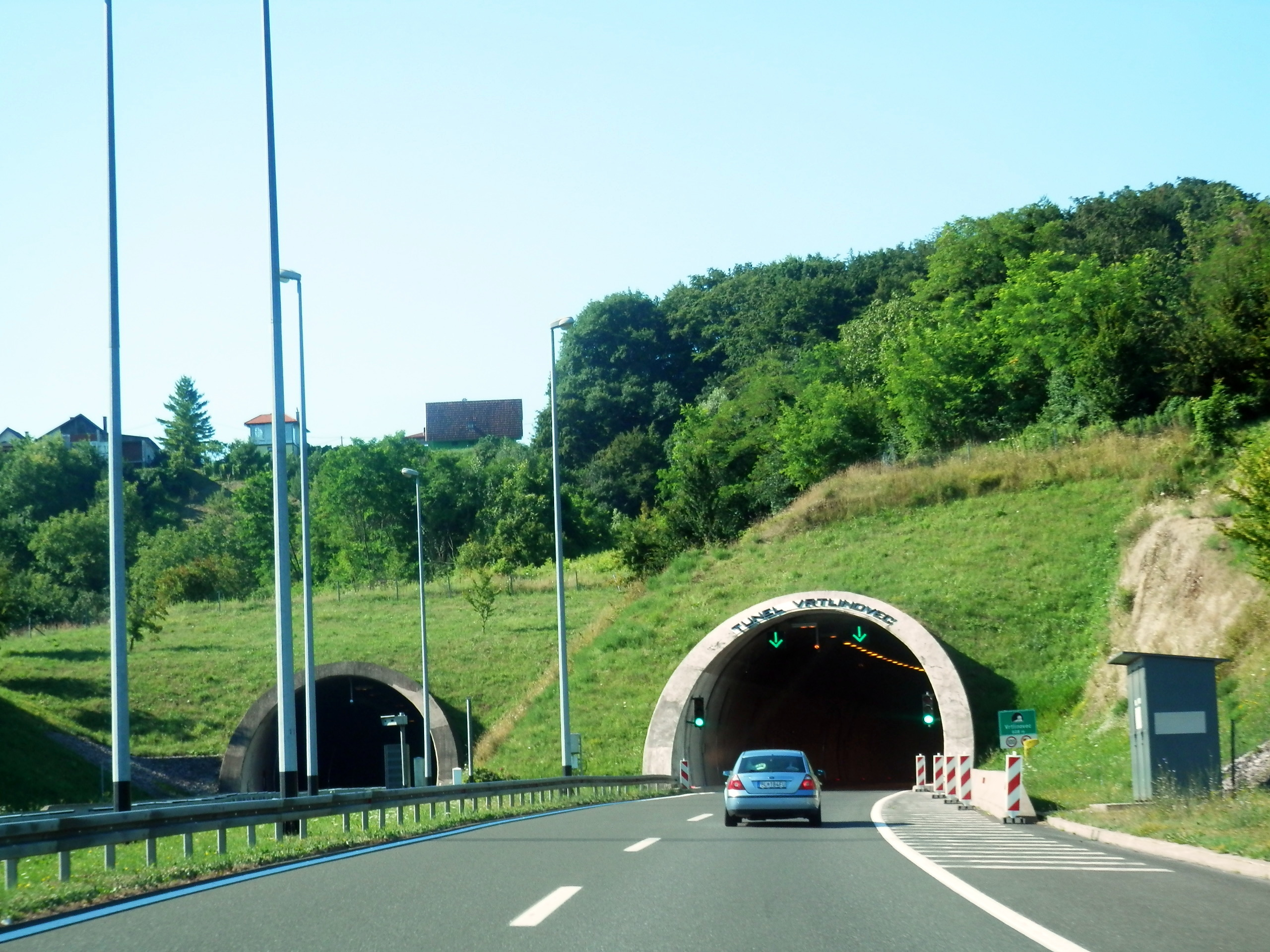 Tunel Vrtlinovec na diaľnici A4 . Chorvátsko. Leto 2016